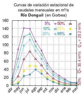 Curvas de variación estacional del río Donguil en Gorbea. # Dirección General de Aguas # Diagnóstico y clasificación de los cursos y cuerpos de agua según objetivos de calidad. Cuenca del río Toltén. # Santiago de Chile # Ministerio de Obras Públicas (Chile) # 2004 # url: # urlarchivo: # Tabla 4.9: Río Donguil en Gorbea (m3/s) , pág. 50 mes 5% 10% 20% 50% 85% 95% abr 17.42 13.78 10.29 5.68 2.40 1.22 may 89.37 66.26 46.03 22.73 9.20 5.21 jun 141.30 120.41 98.52 65.24 35.98 23.27 jul 140.39 127.92 112.81 83.93 48.36 27.47 ago 108.85 97.43 85.18 65.90 48.04 39.89 sep 86.27 76.24 65.78 49.97 35.94 29.57 oct 55.55 48.60 41.35 30.40 20.68 16.27 nov 34.30 29.66 24.87 17.76 11.73 9.19 dic 25.22 20.72 16.33 10.37 5.92 4.26 ene 16.21 13.13 10.07 5.79 2.46 1.17 feb 8.38 7.10 5.77 3.76 1.98 1.17 mar 8.26 6.93 5.55 3.46 1.61 0.76 This plot was created with Gnuplot.